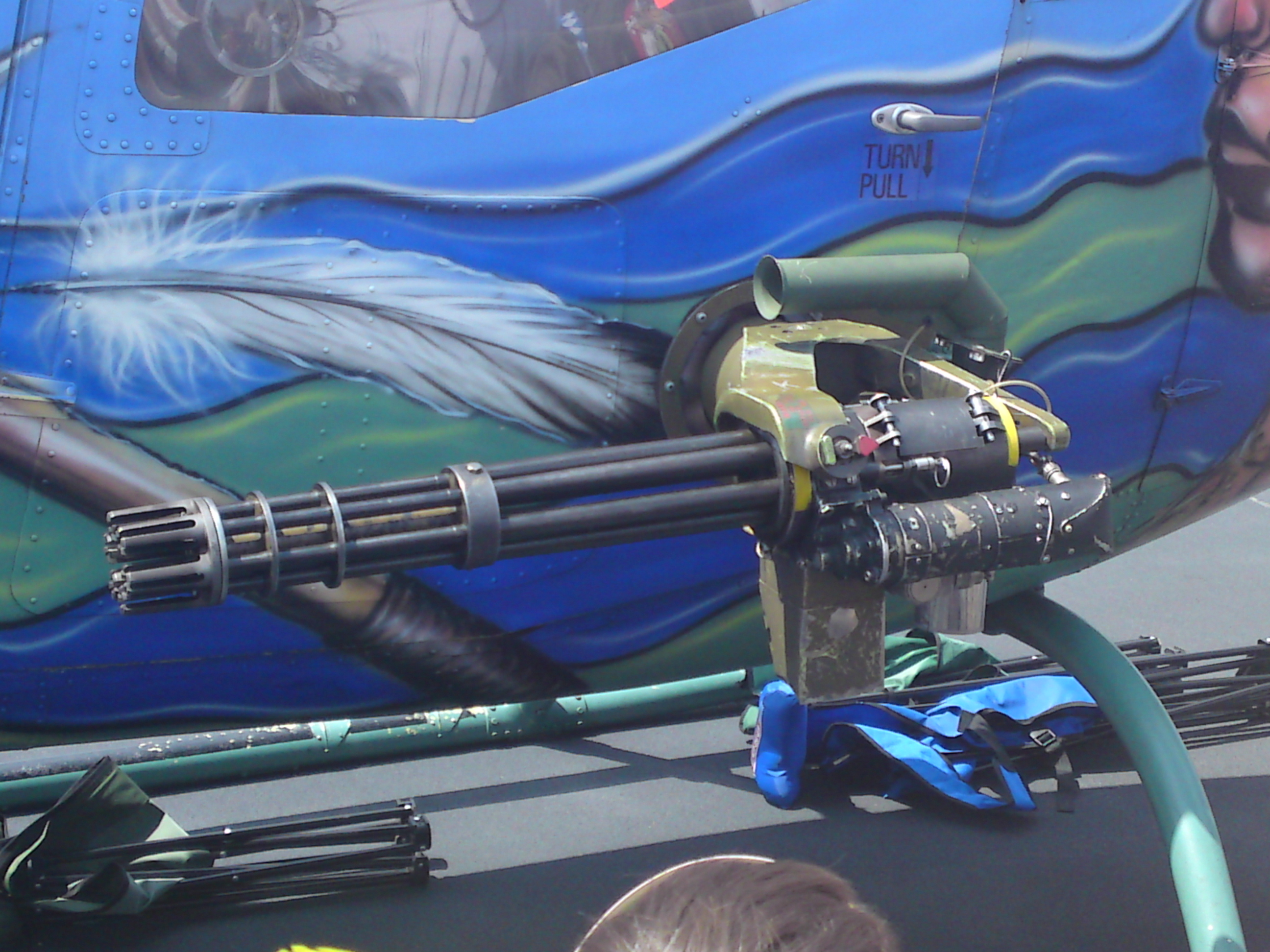 Gatling Minigun